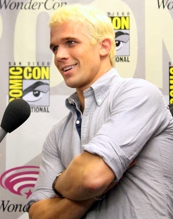 Cam Gigandet, WonderCon 2011.